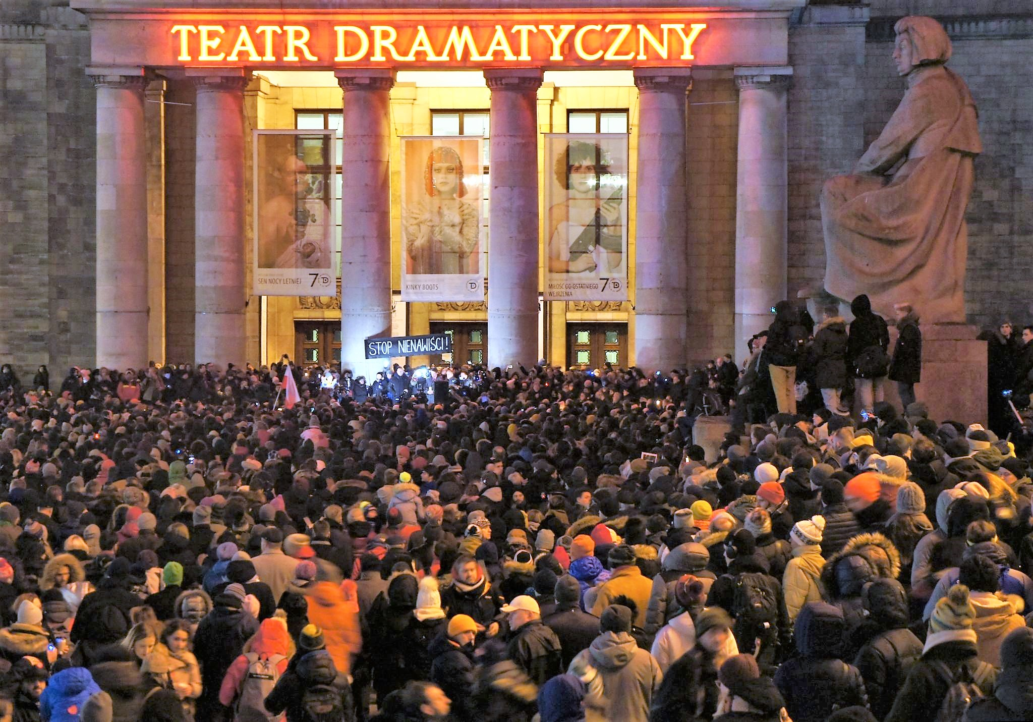 Marsz przeciwko przemocy w Warszawie zorganizowany na pl. Defilad w dniu 14 stycznia 2019 po śmierci prezydenta Gdańska Pawła Adamowicza.